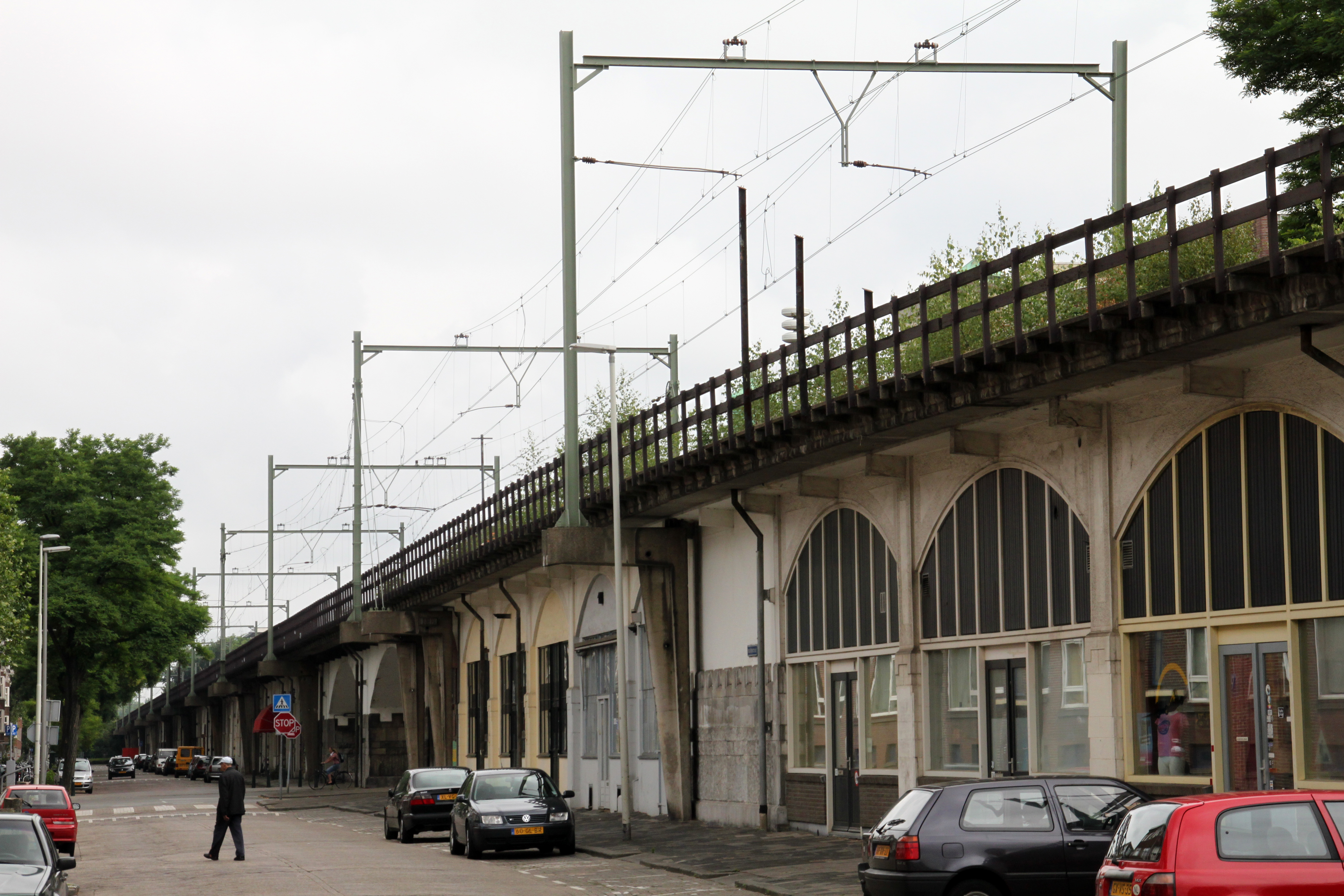 Het Hofpleinlijviaduct.